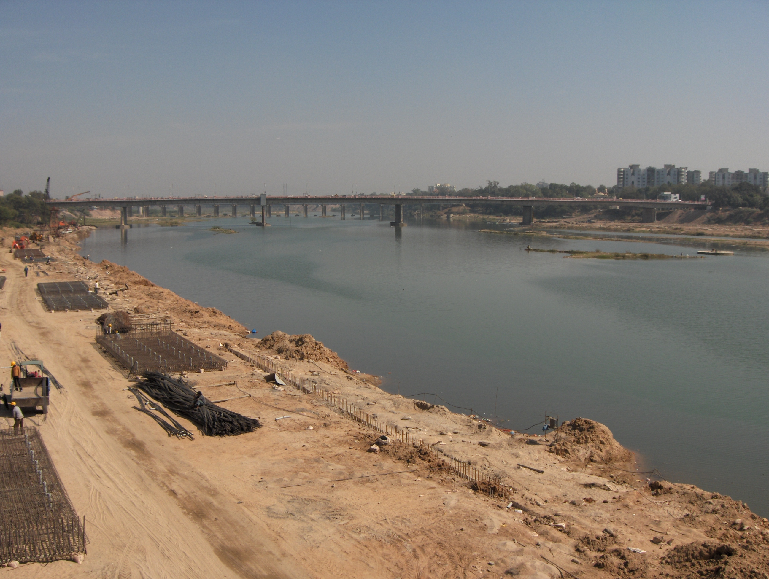 Sabarmati River near Ahmedabad, Gujarat, India